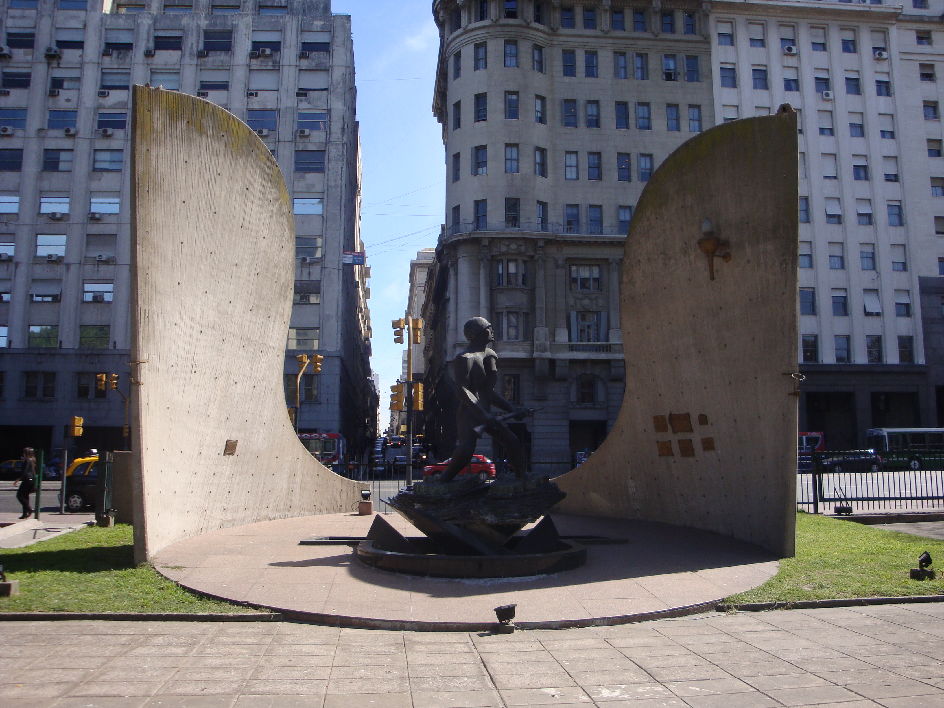 Avenida Paseo Colón esquina Adolfo Alsina, vista desde los jardines del Edificio Libertador. De frente una estatua.